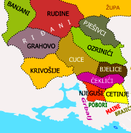 Krivošije.